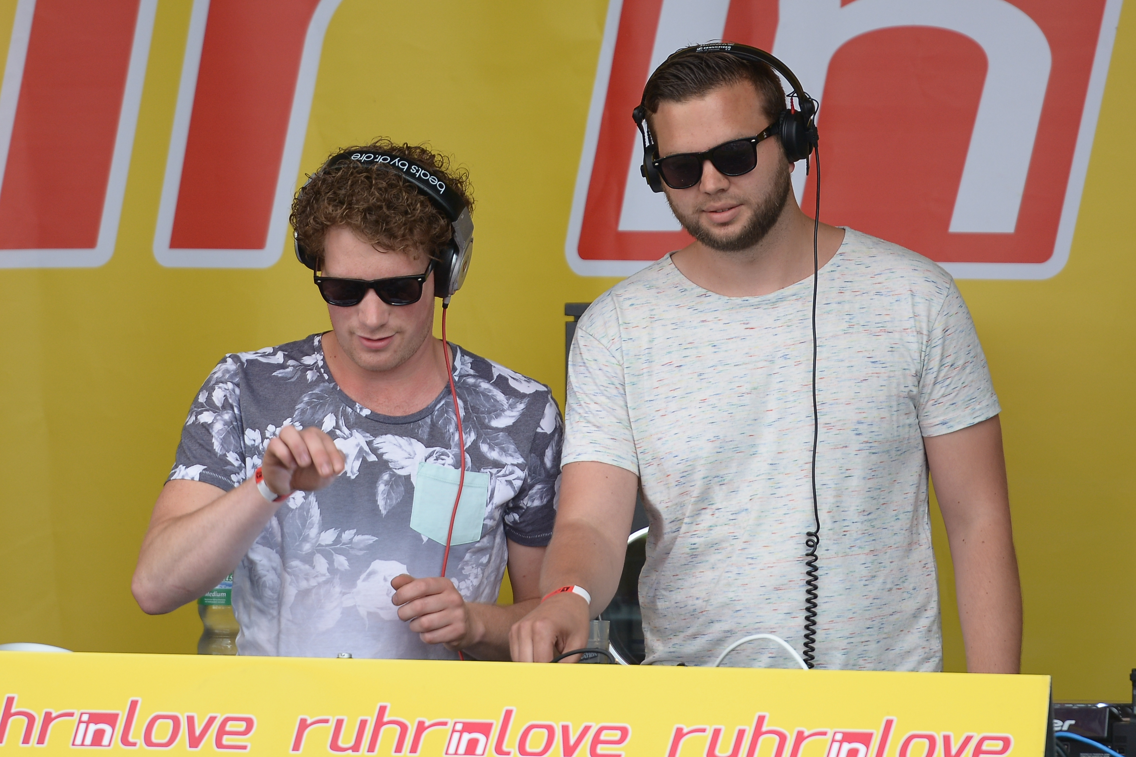 East & Young bei Mayday 2015